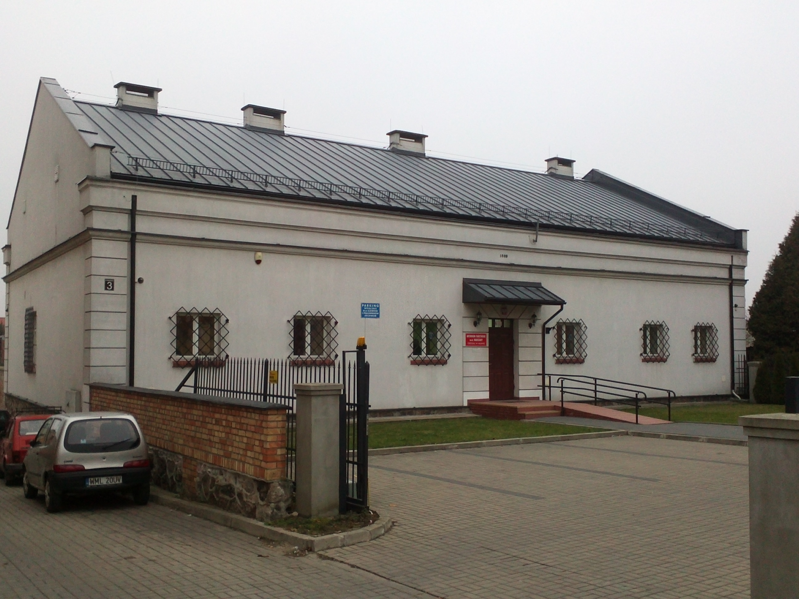 Budynek archiwum, dawne więzienie.